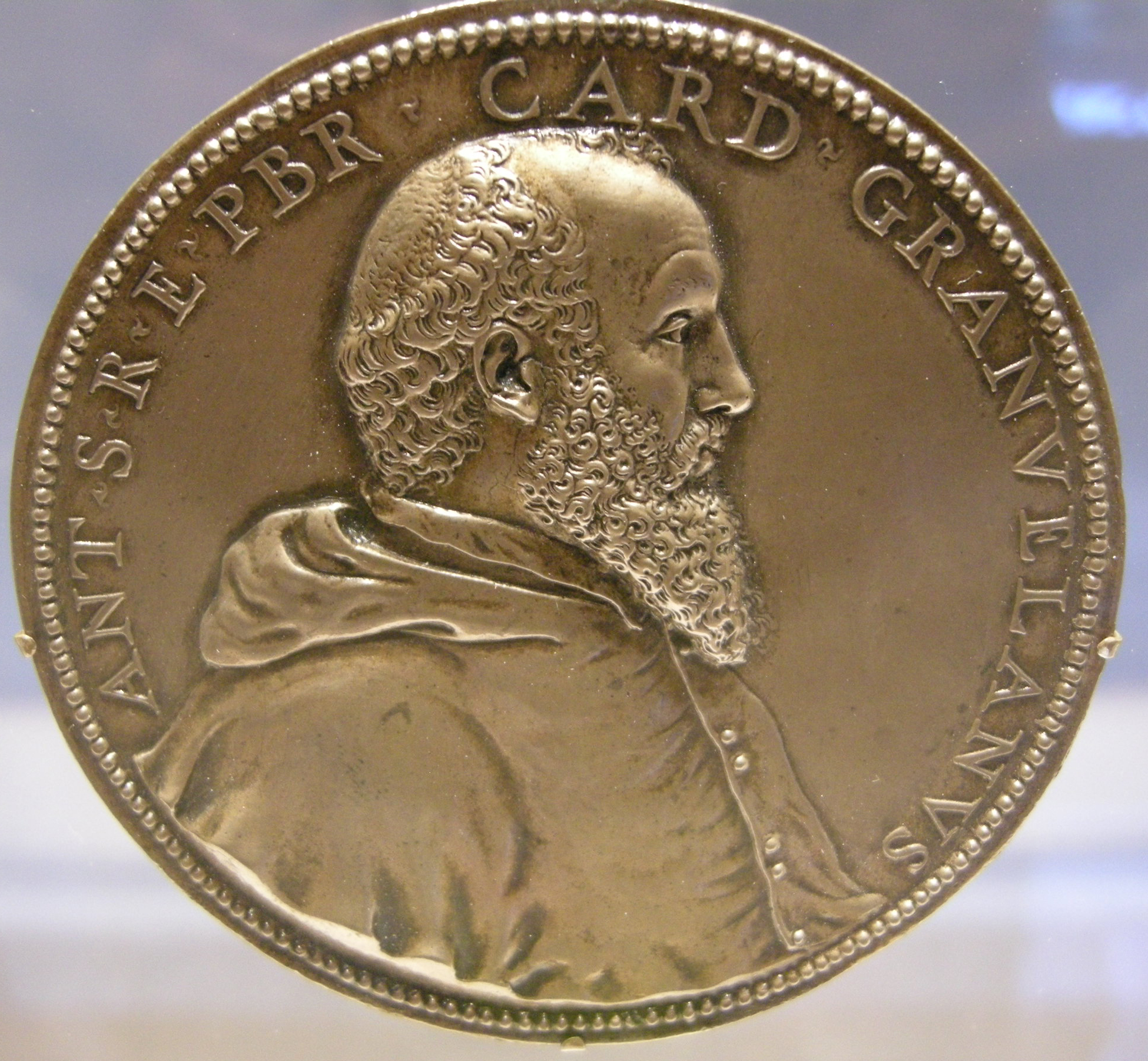 Antoine perrrenot, cardinal granvelle, post 1561